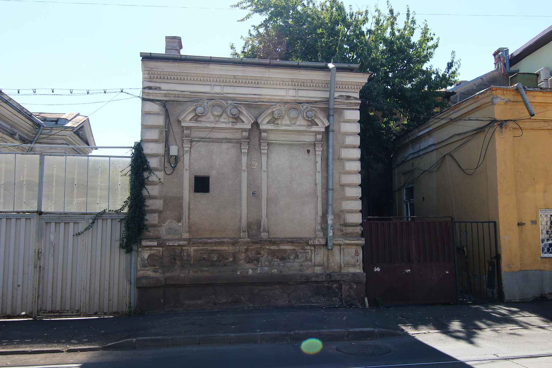 Casă pe Calea Călărașilor